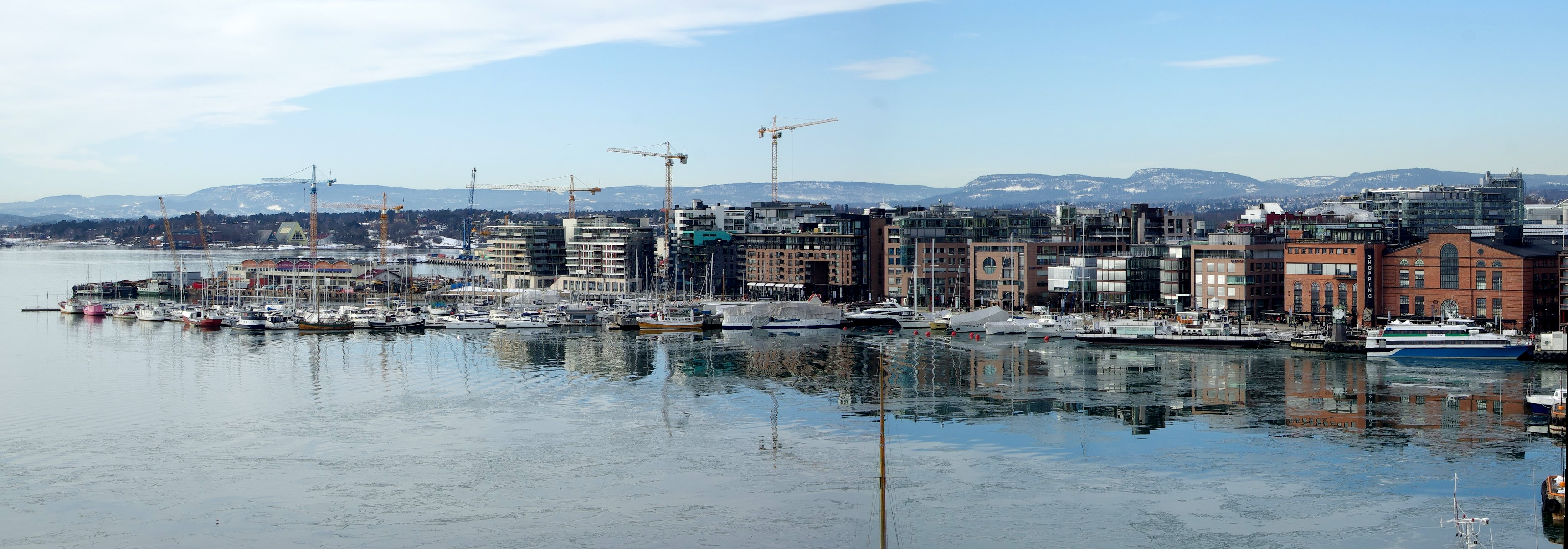 Aker brygge og Tjuvholmen